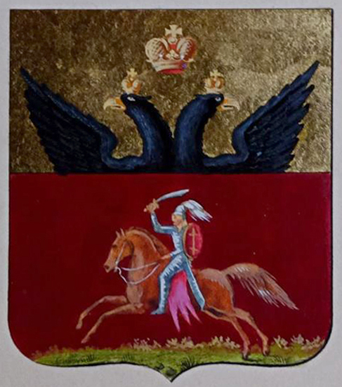 Беларуская (тарашкевіца): Дынабург (Dynaburg). Герб места з «Пагоняй» («Pahonia»)